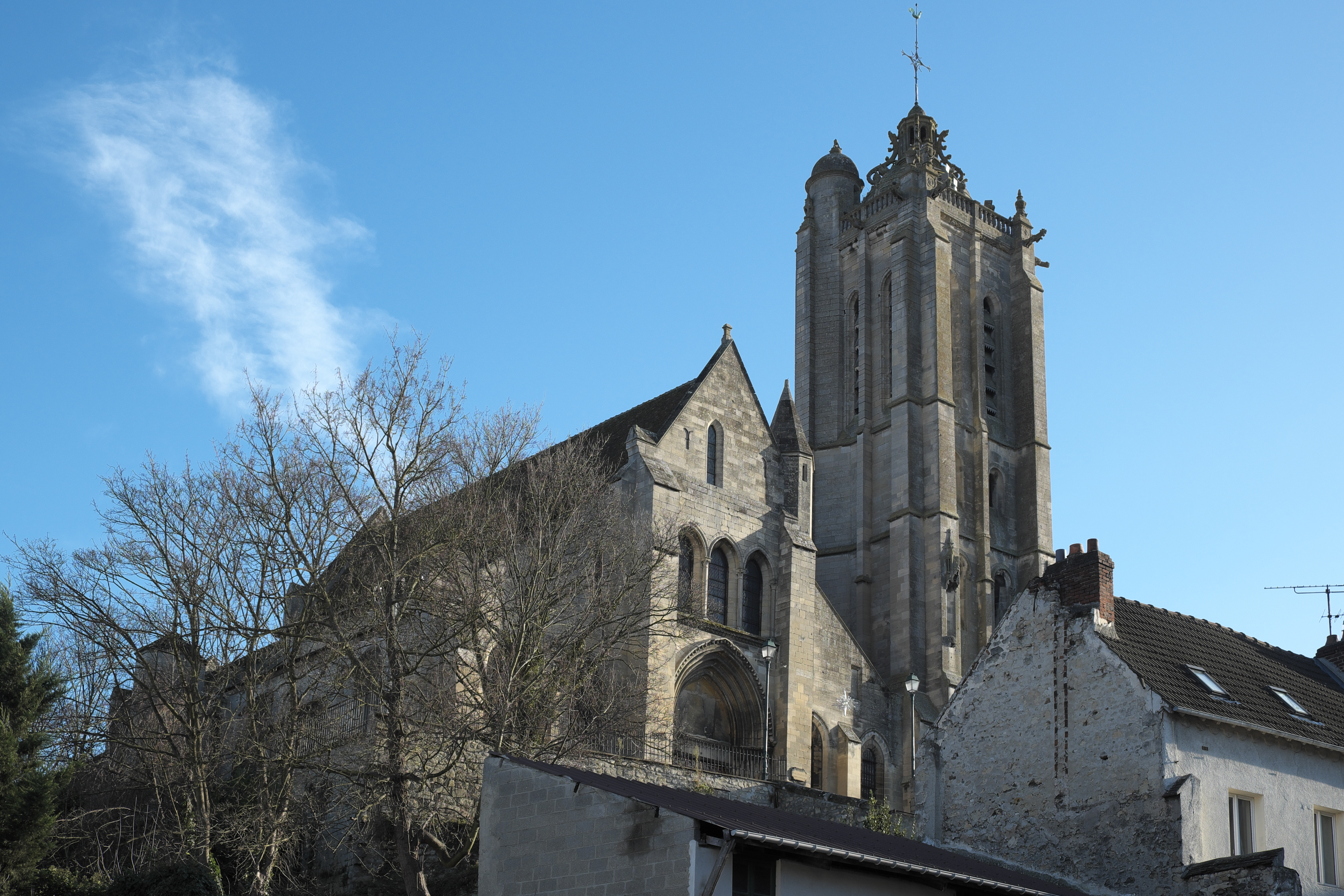 Katholische Pfarrkirche Saint-Laurent in Beaumont-sur-Oise im Département Val d'Oise (Île-de-France/Frankreich)